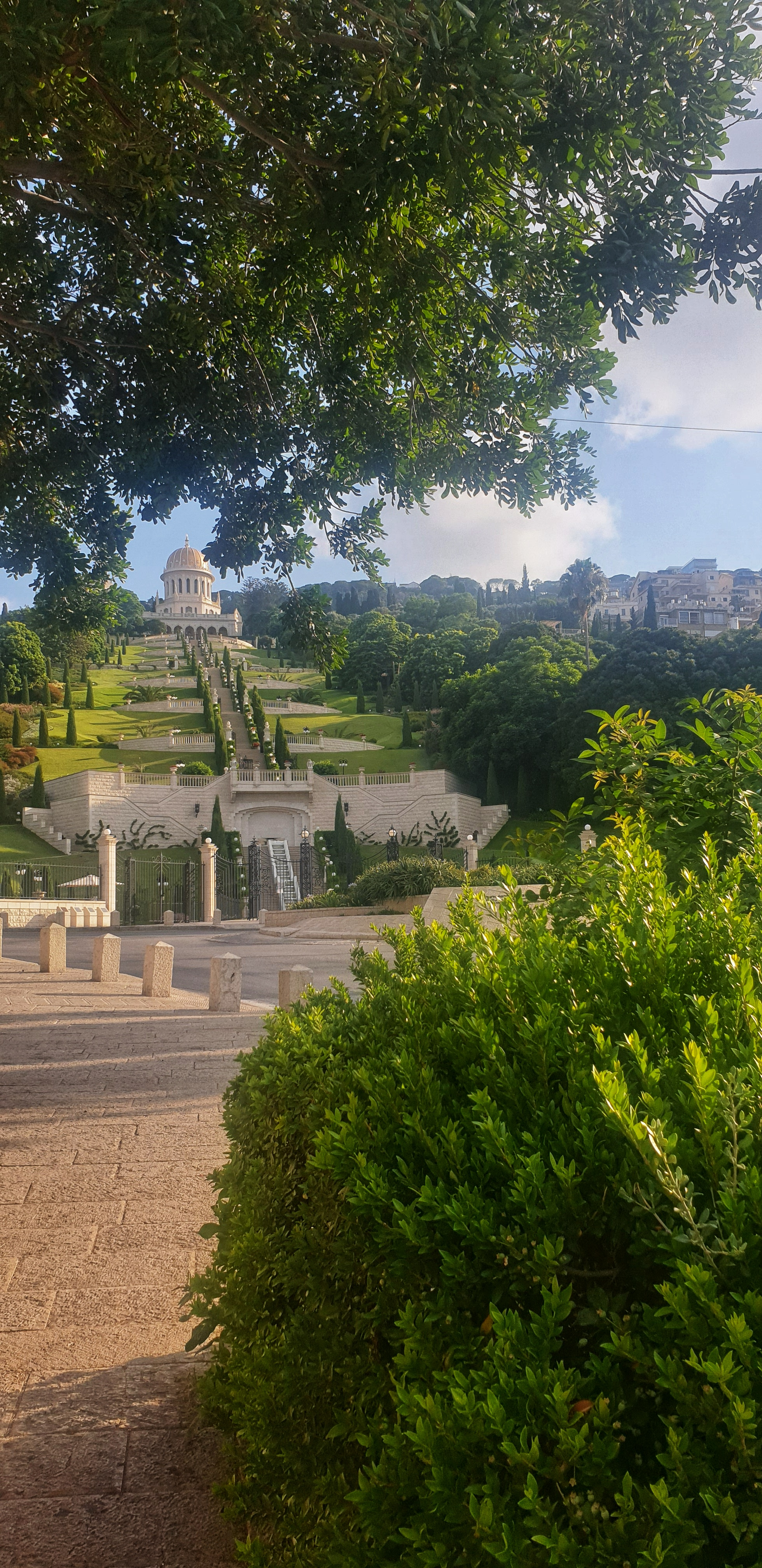 الحدائق البهائية- الحي الألماني